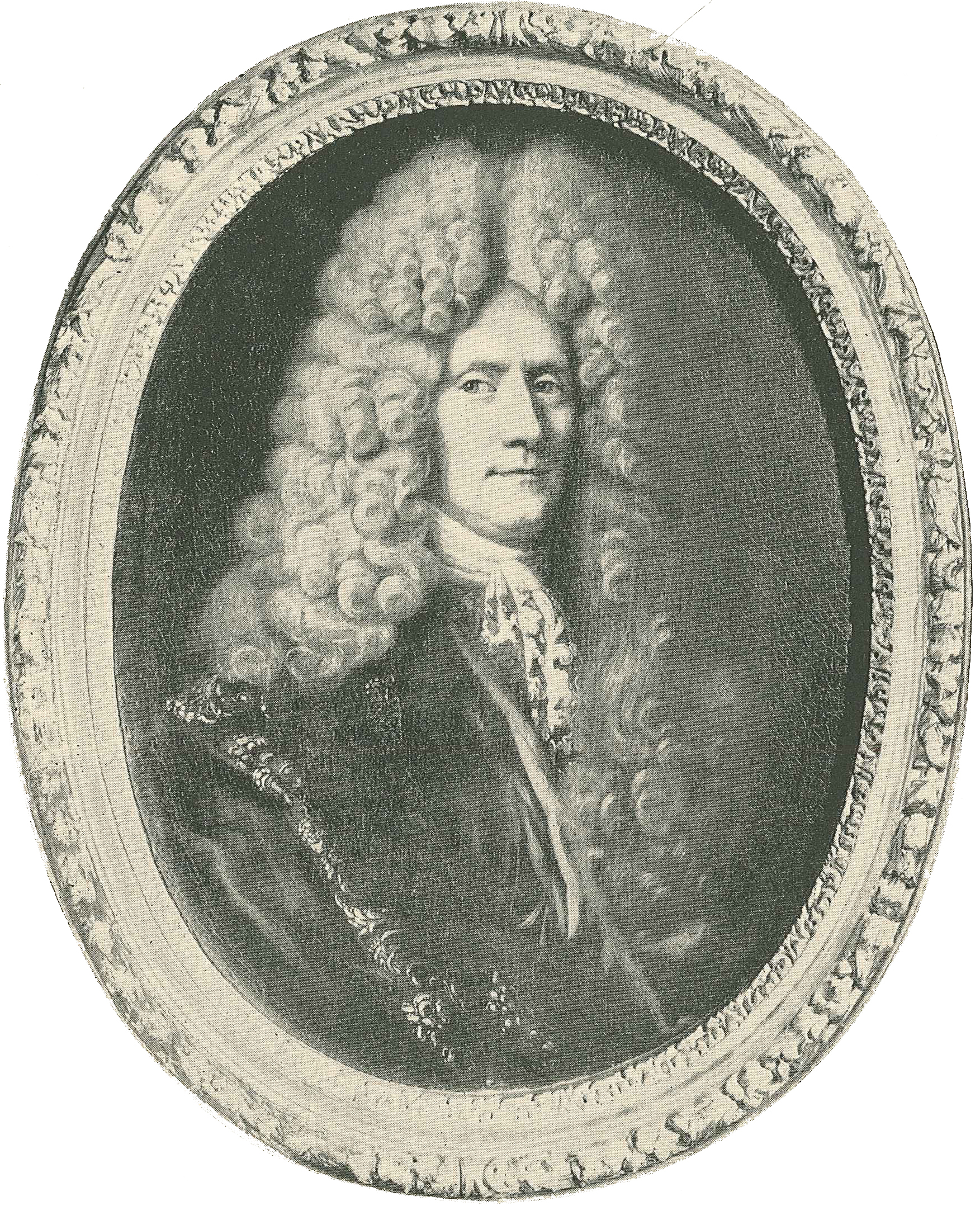 Friherre Johan Rosenhane (1642–1710)title QS:P1476,sv:"Friherre Johan Rosenhane (1642–1710)" label QS:Lsv,"Friherre Johan Rosenhane (1642–1710)"